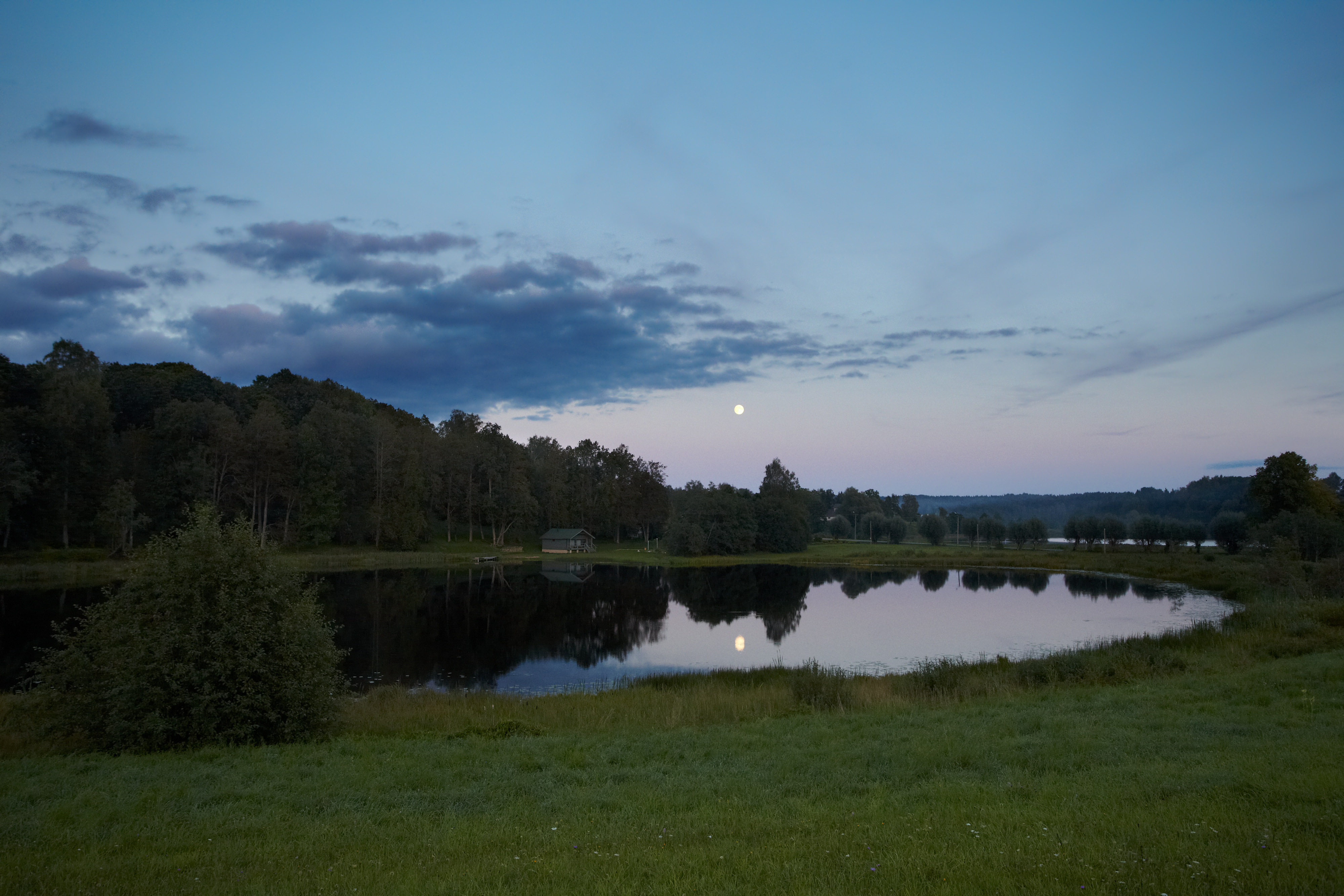 Rõuge Kaussjärv 2012. aasta augustis.